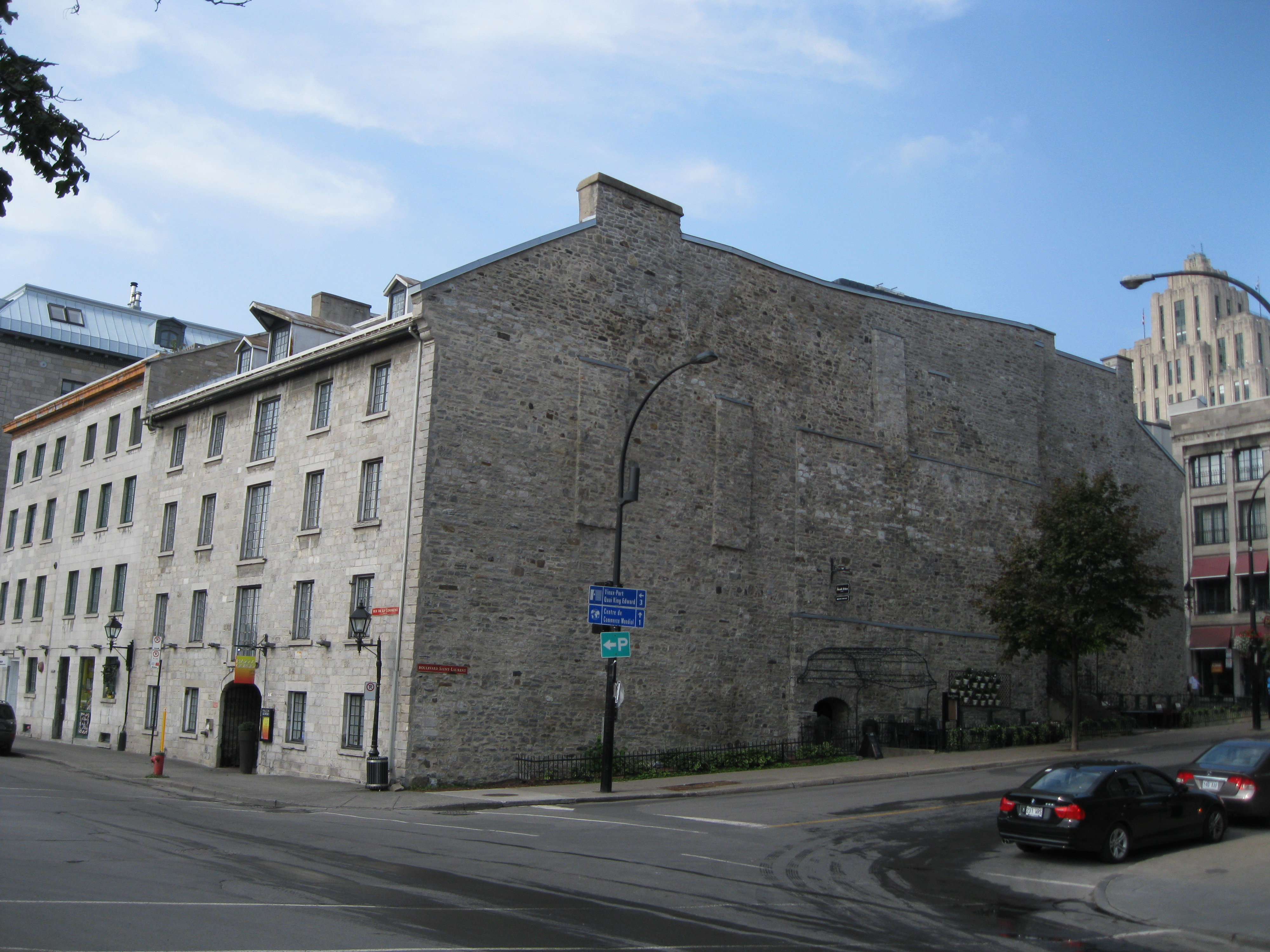 Maison Elizabeth-Mittleberger-Platt, 200-222, boulevard Saint-Laurent, 3, rue de la Commune Ouest, 6-12, rue Saint-Paul Ouest, Montréal